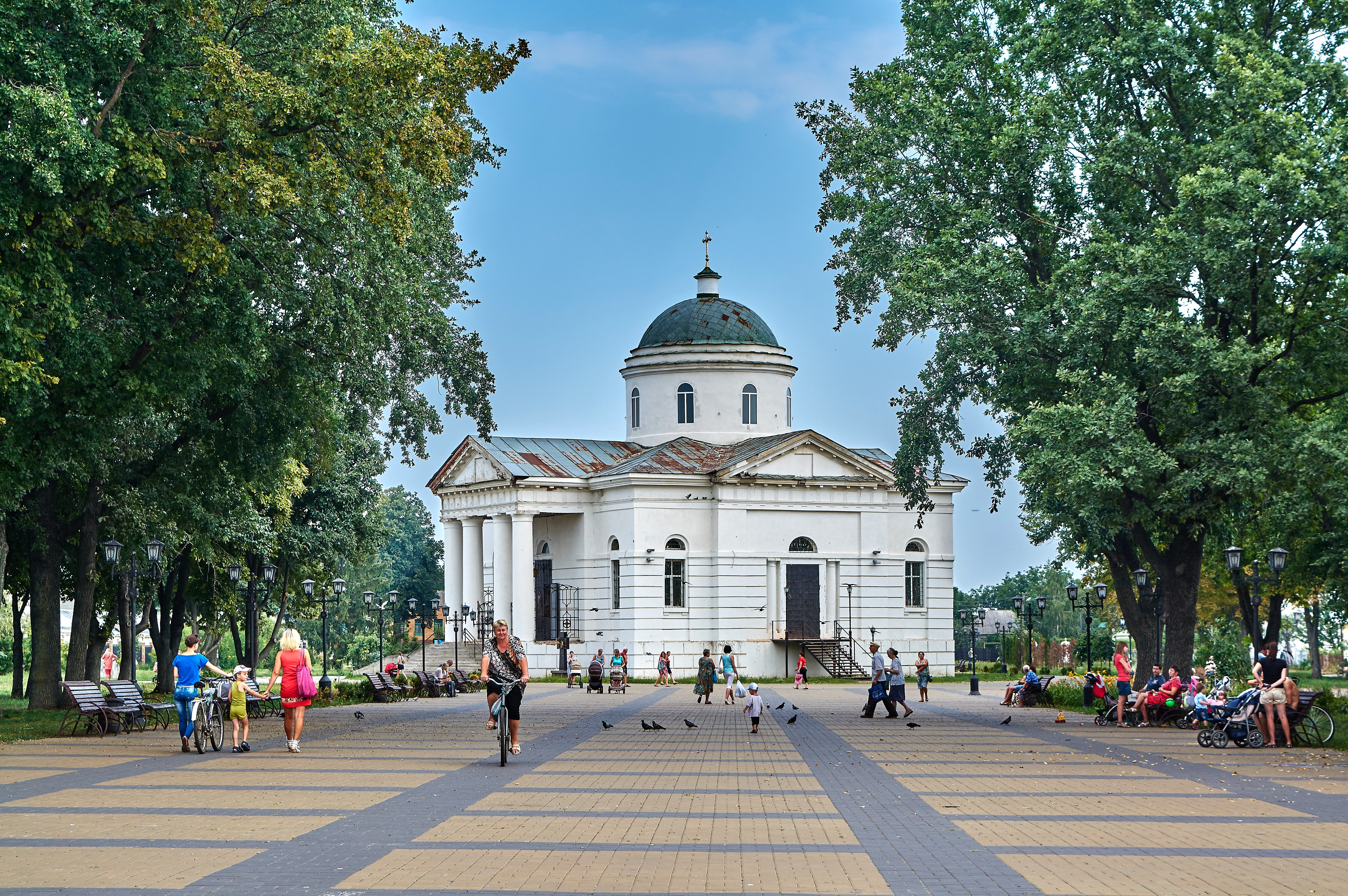 Церква Рiздва Богородицi (мур.), Прилуки, вул. Галаганівська, 16